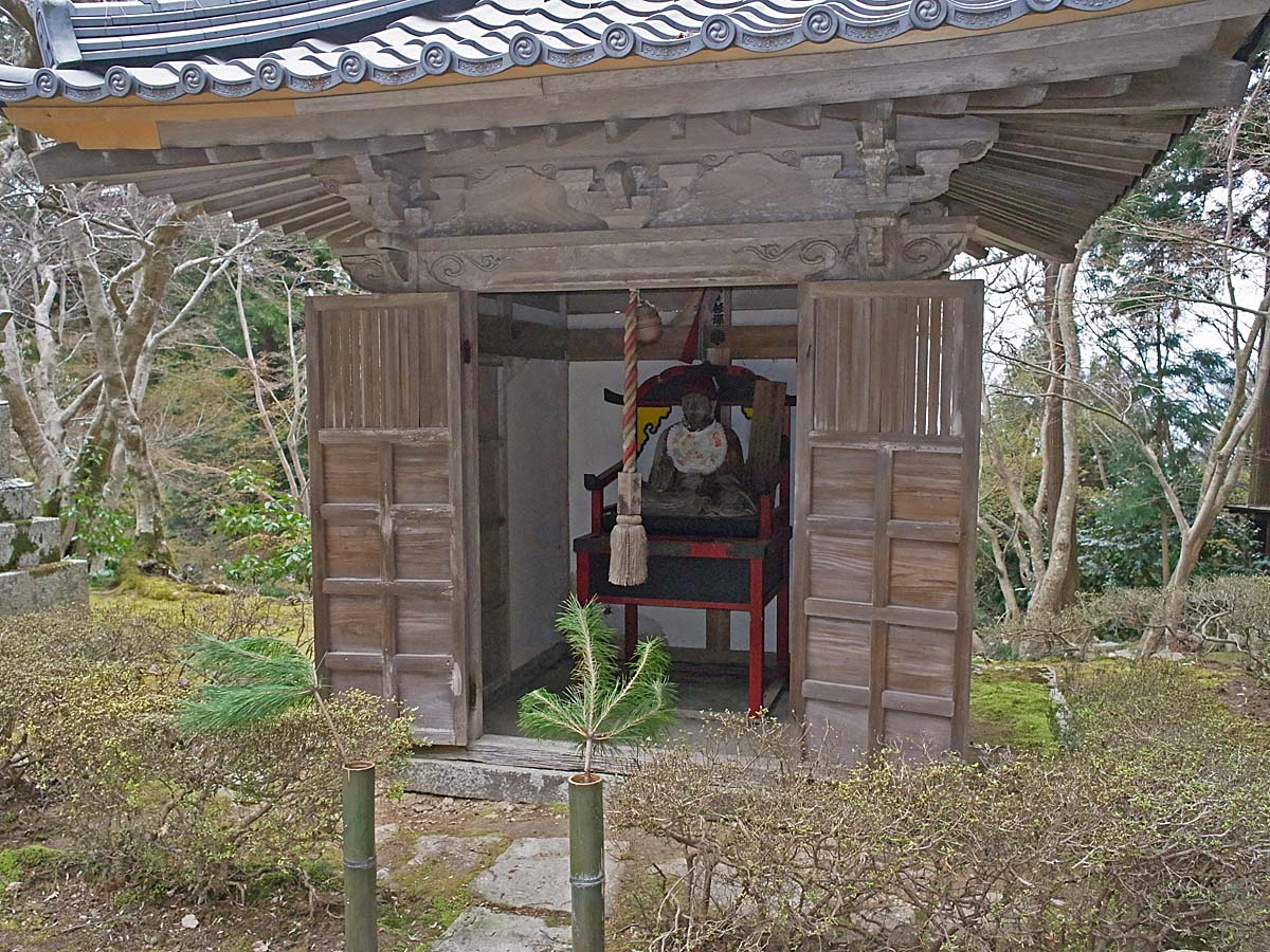 Kawaraya Temple , 瓦屋禅寺